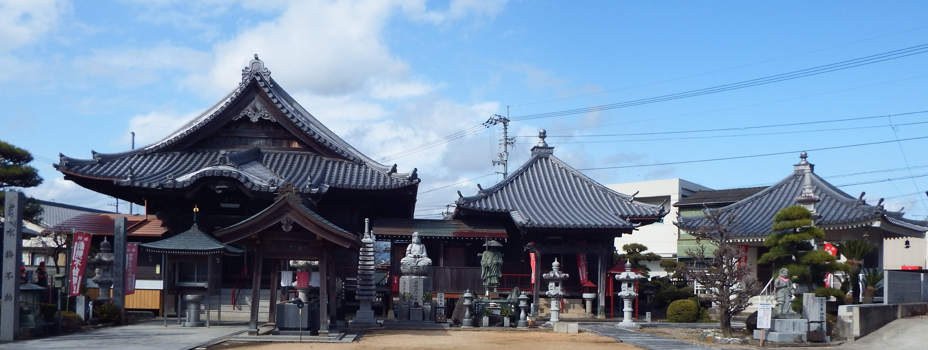 密厳寺の堂宇